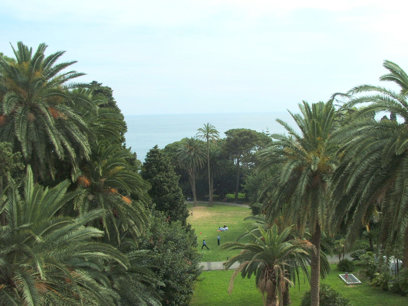 Parco di Nervi, Genova